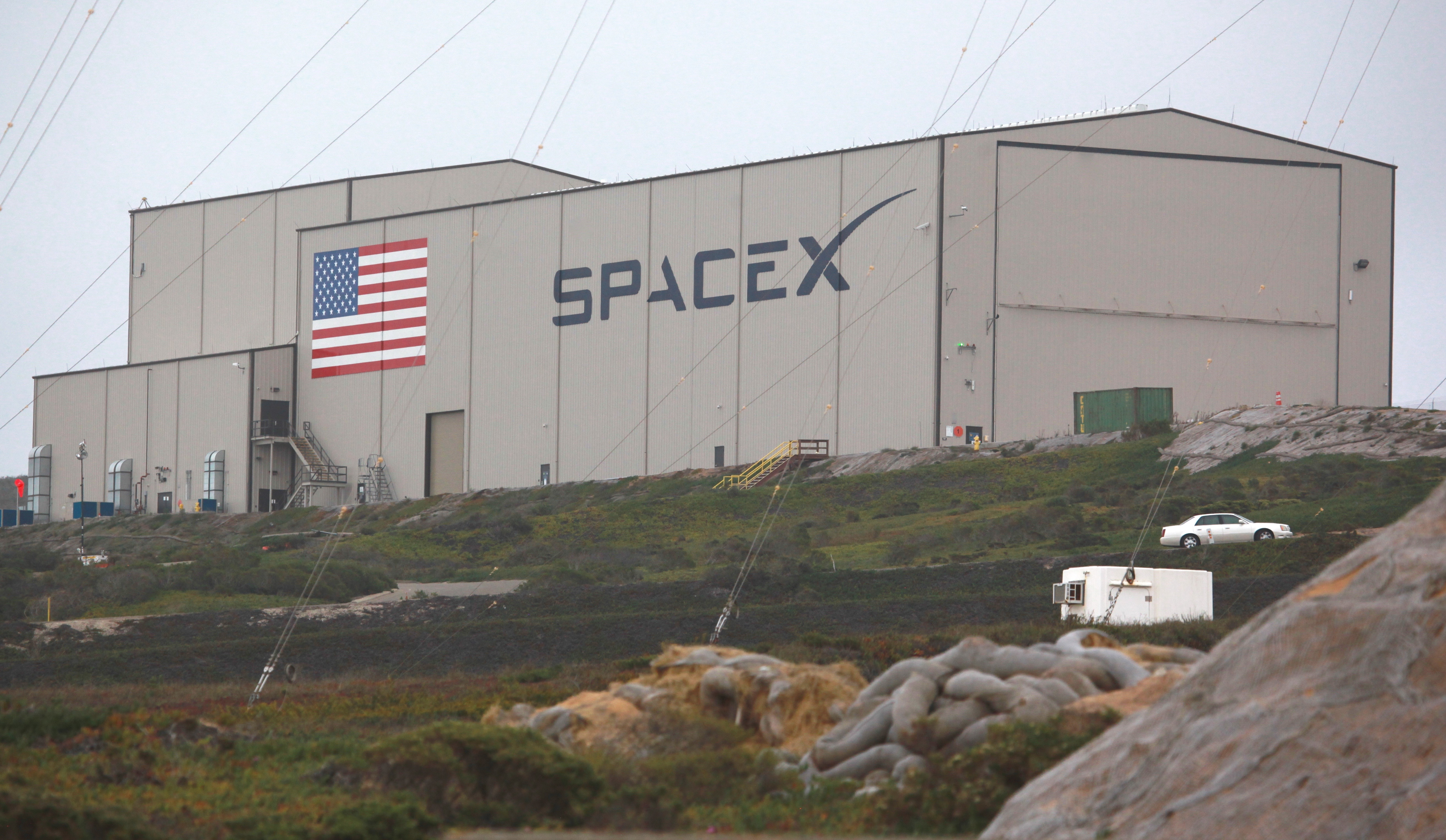 SpaceX Hangar at Vandenberg AFB